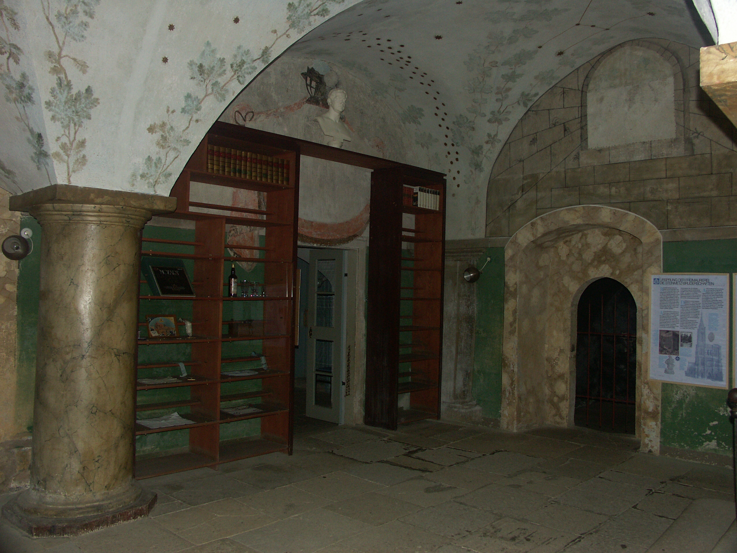 Logenraum in Schloss Kuckuckstein